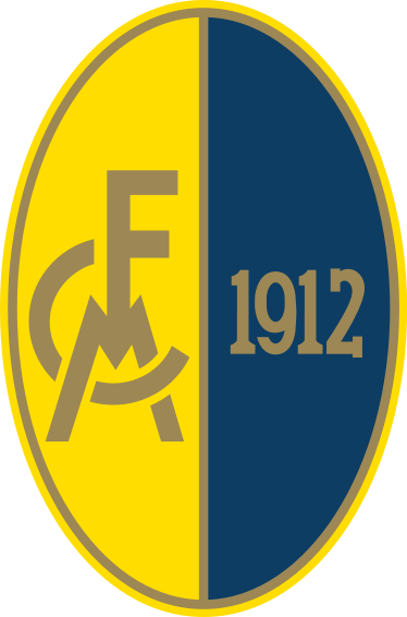 FC Módena